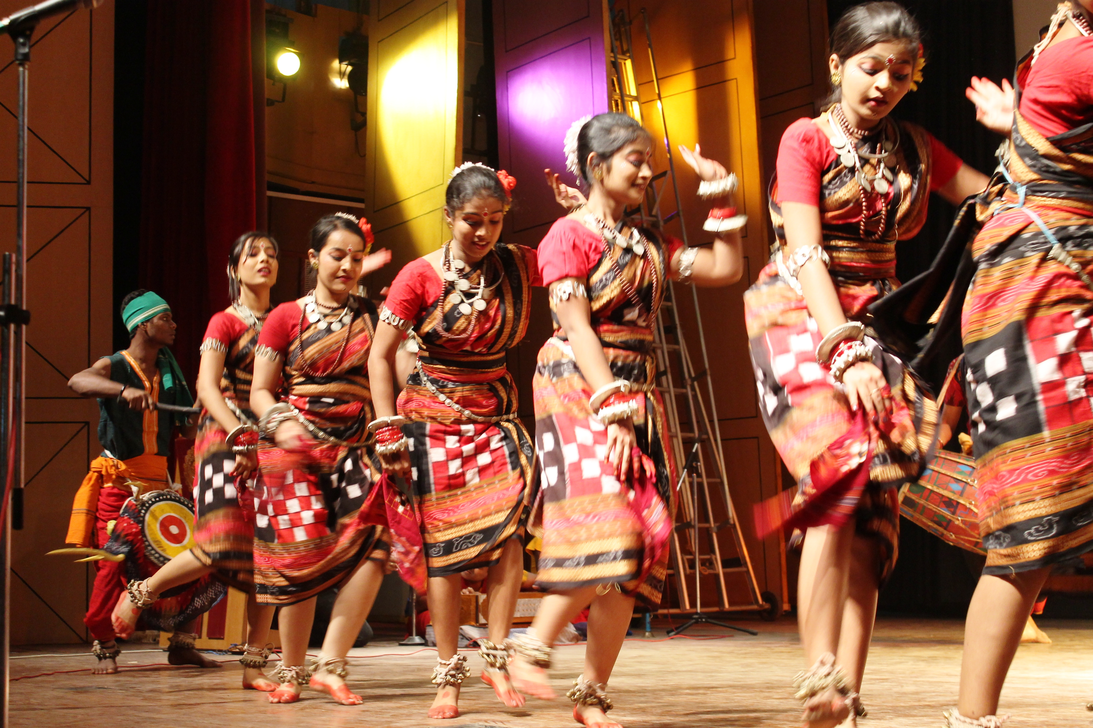 ଓଡ଼ିଆ: Sambalpuri Dance